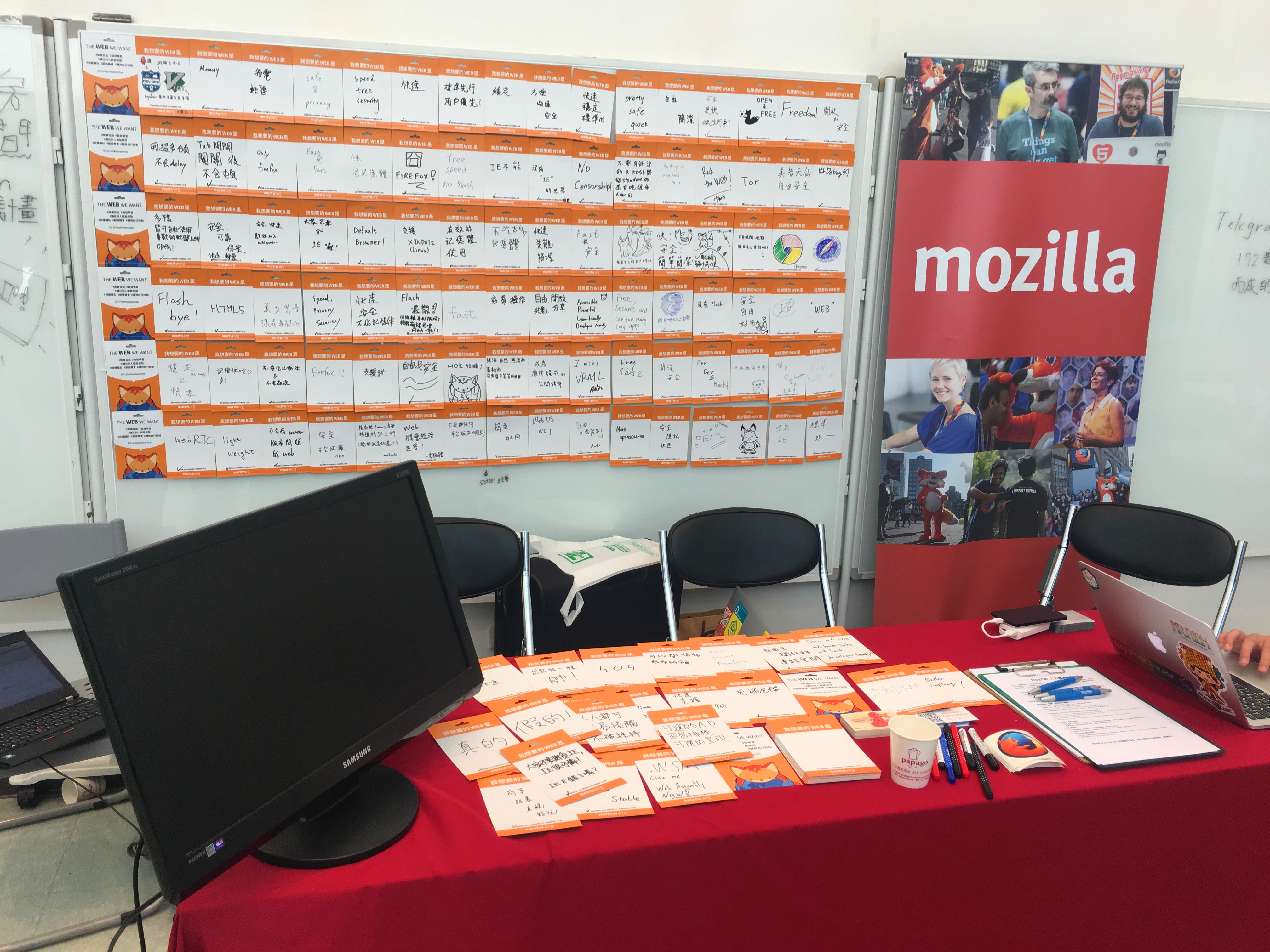 中文（中国大陆）: MozTW在COSCUP 2016的摊位